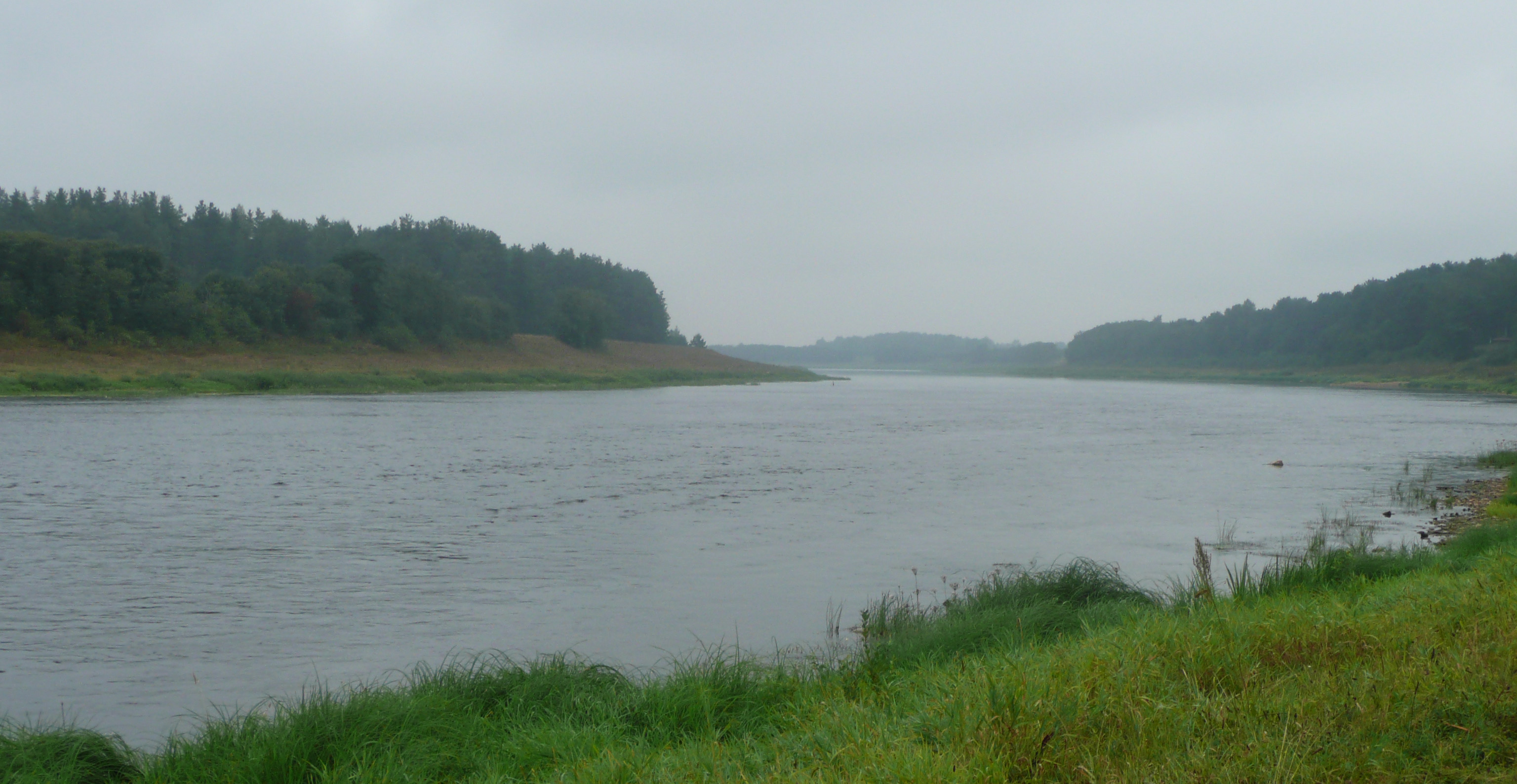 Волга ниже Старицы